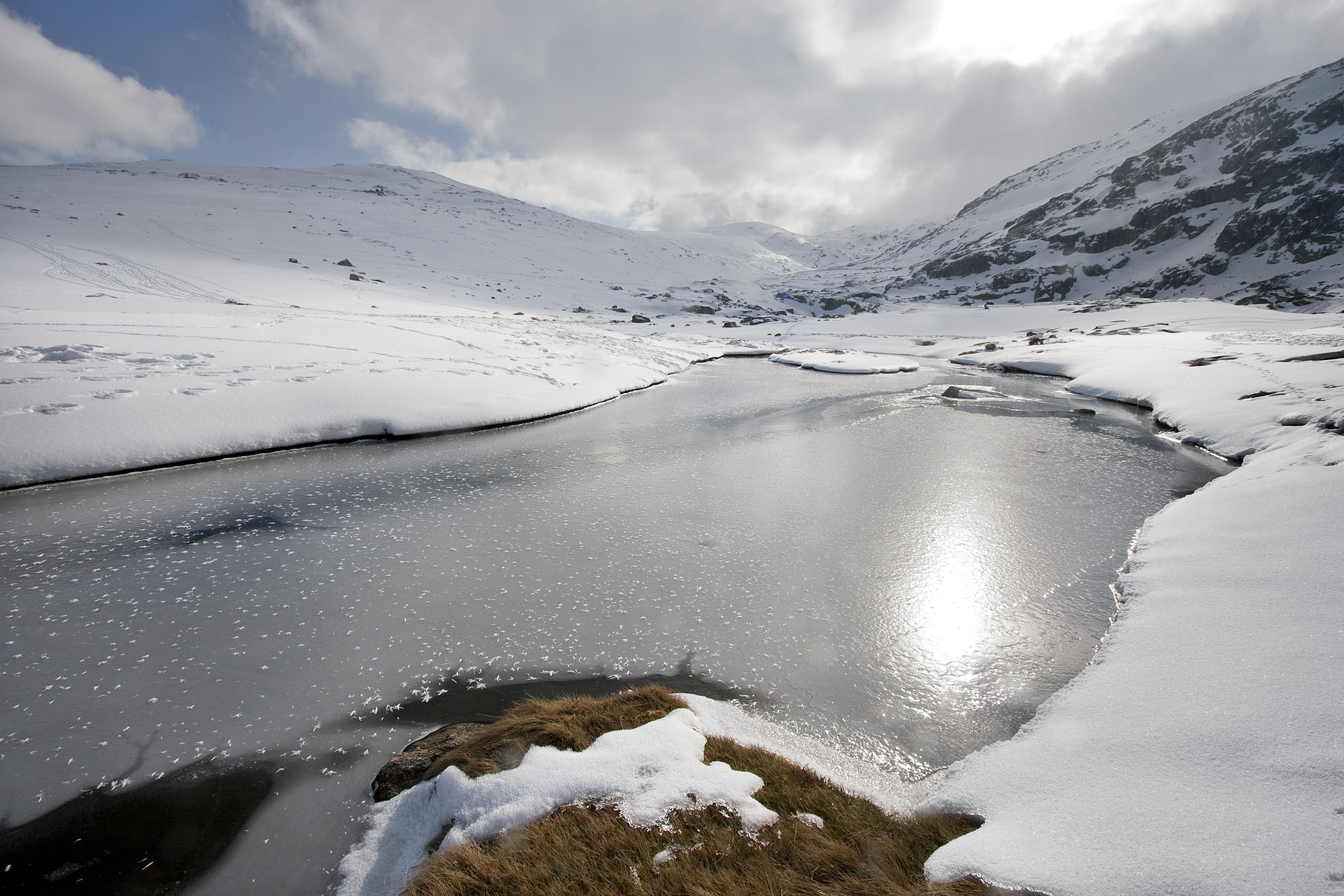 Prado de Las Pozas; bajando del Morezón, Sierra de Gredos, España.